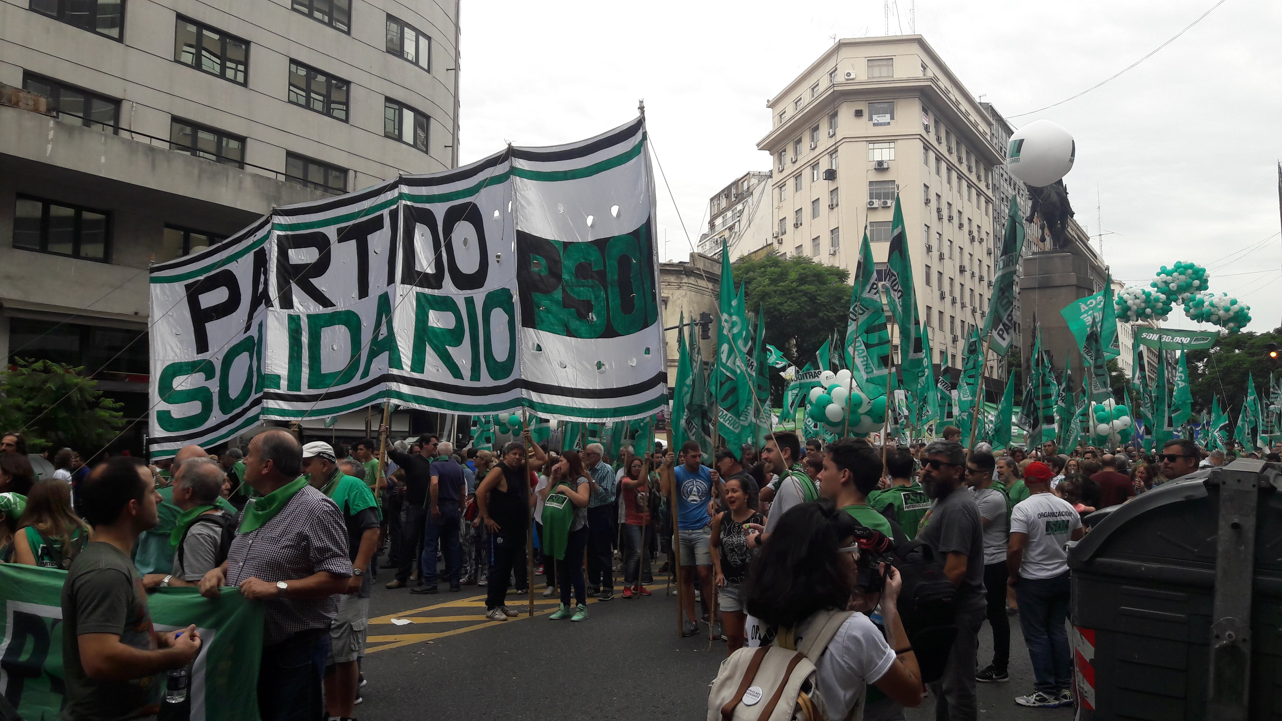 24M Marcha de la Memoria por la Verdad y Justicia en Buenos Aires, Argentina.